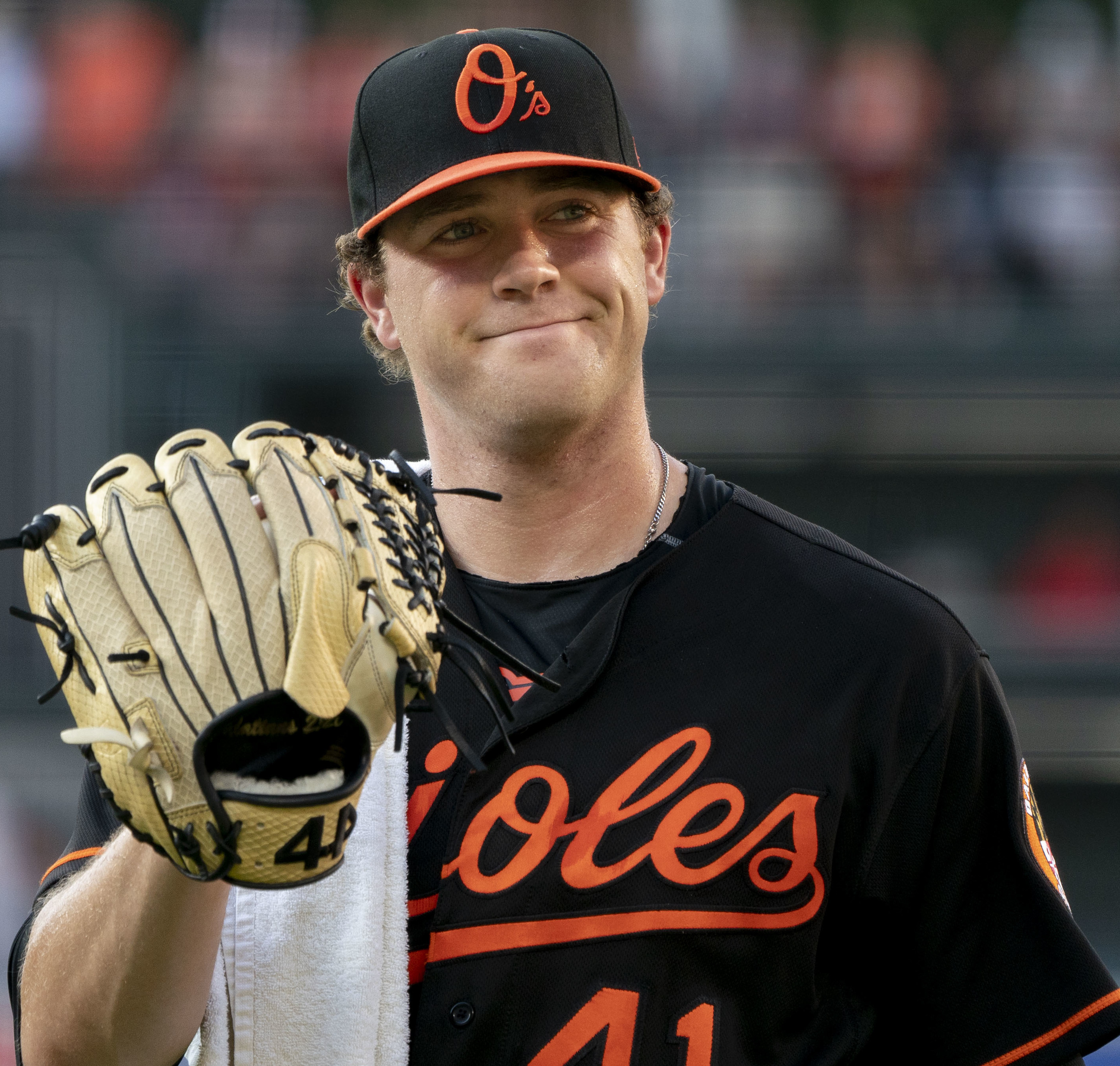 Angels at Orioles 6/29/18